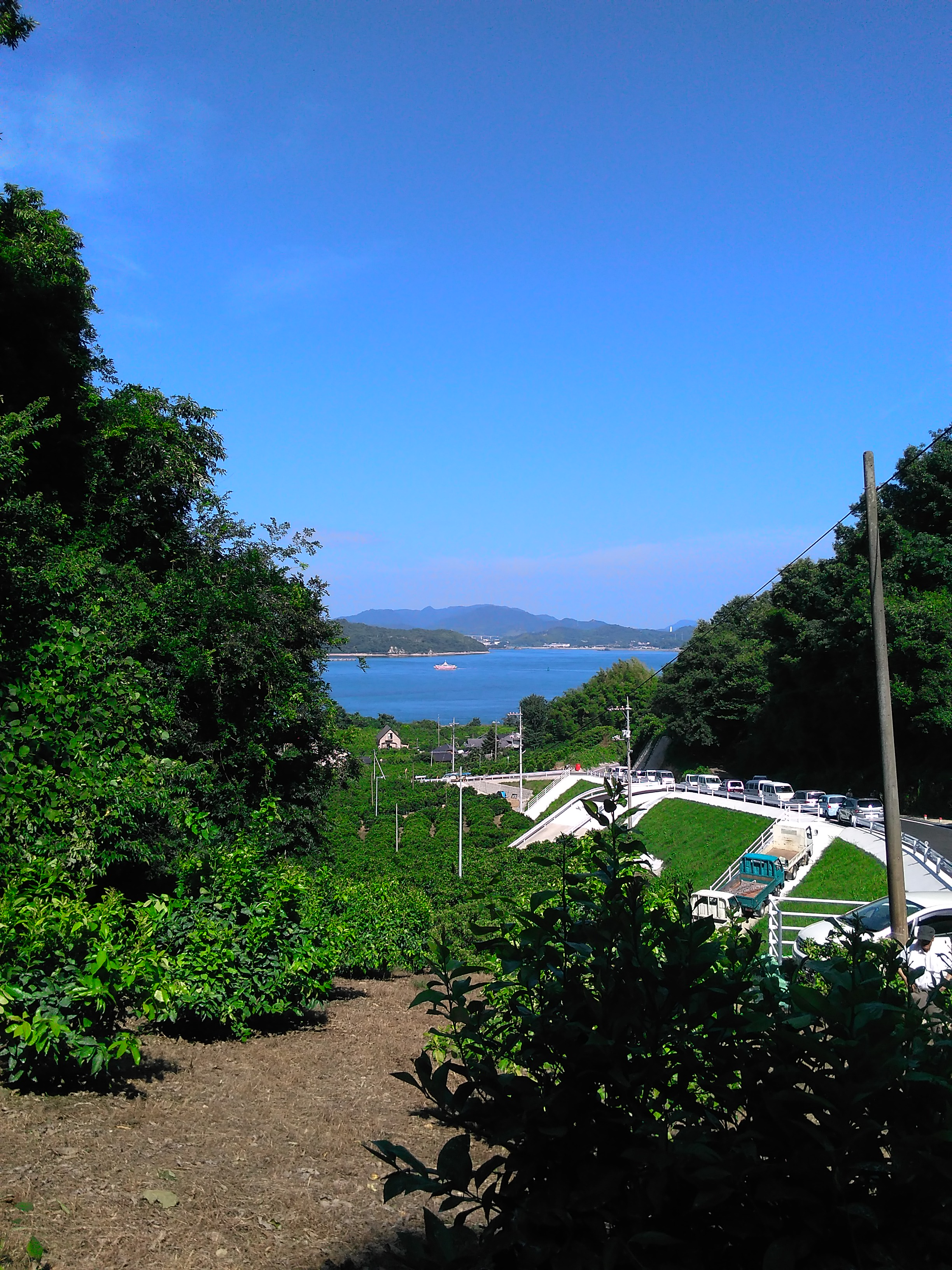 高根隧道より東側を望む。